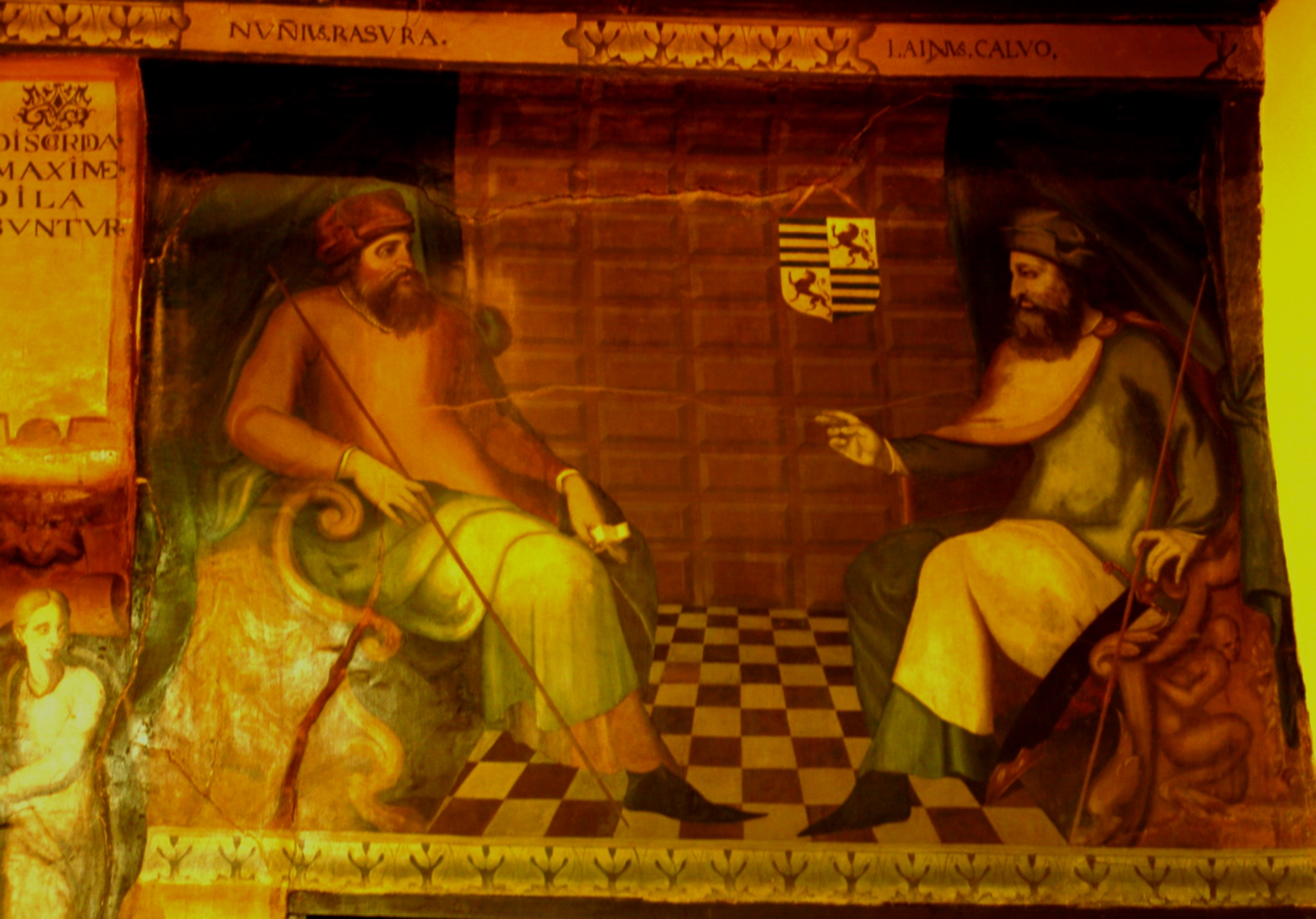 Jueces de Castilla, Laín Calvo y Nuño Rasura, fresco, Arco de Santa María, Burgos, España